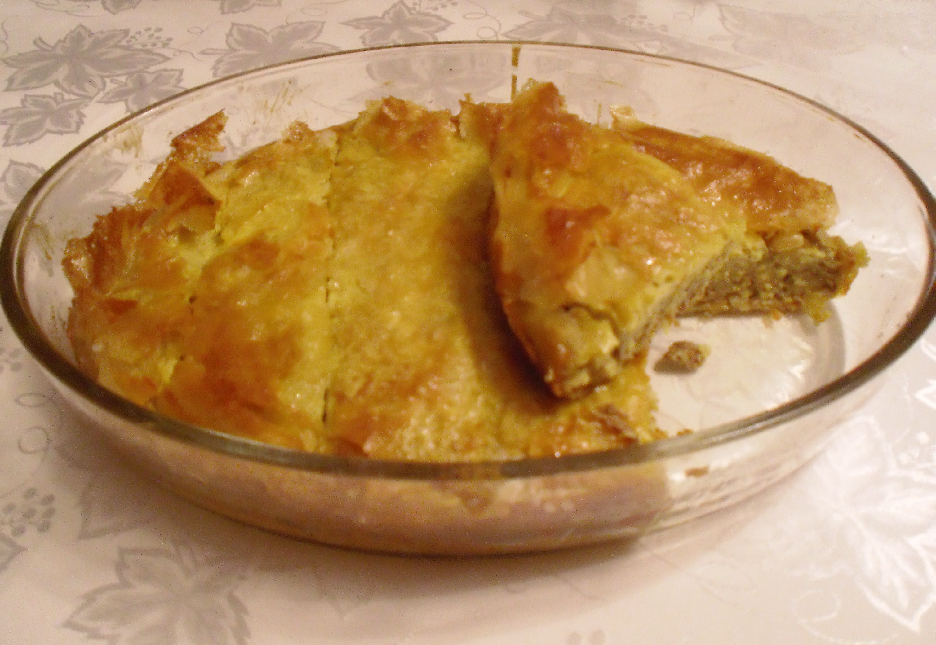 Tajine malsouka originaire de Tunisie